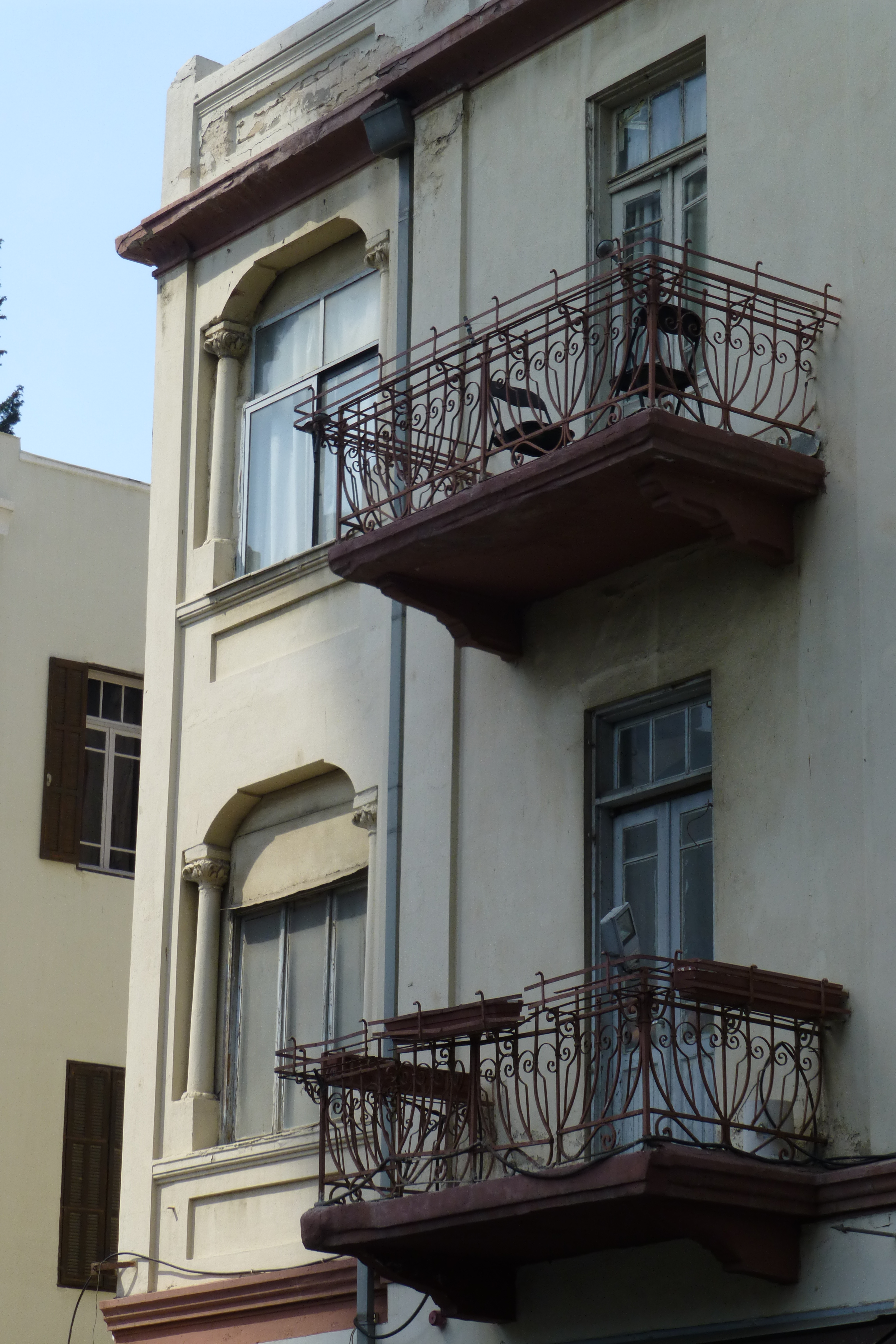 בית בשדרות רוטשילד פינת אלנבי בתל אביב. תוכנן על ידי האדריכל יוסף ברלין בשנת 1922. הסגנון העיצובי אקלקטי. המעקות מעוצבים כחנוכייה, ואת החלונות מעטרים עמודים קורינתיים. על החזיתות משובצים אריחי קרמיקה צבעוניים האריחים מציגים נופים מארץ ישראל וסיפורים מן התנ"ך. בחזית הפונה לאלנבי – ציור העיר ירושלים, וכן ציון שם בעלי הבית.